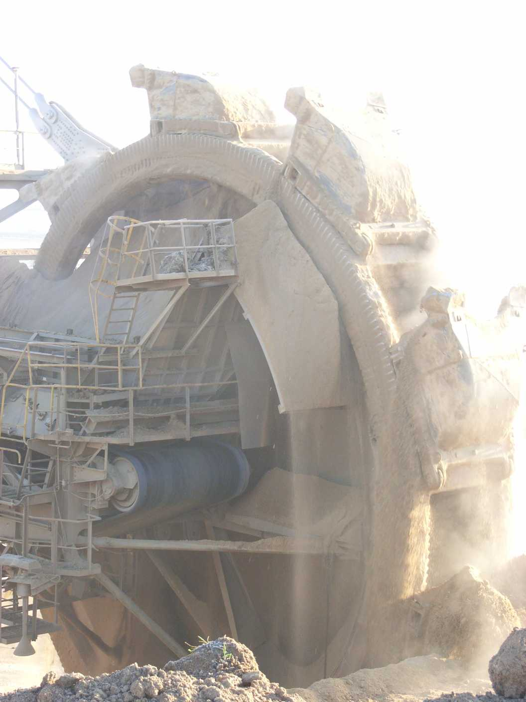 Schaufelradbagger 258, Garzweiler II bei Spenrath (NRW)